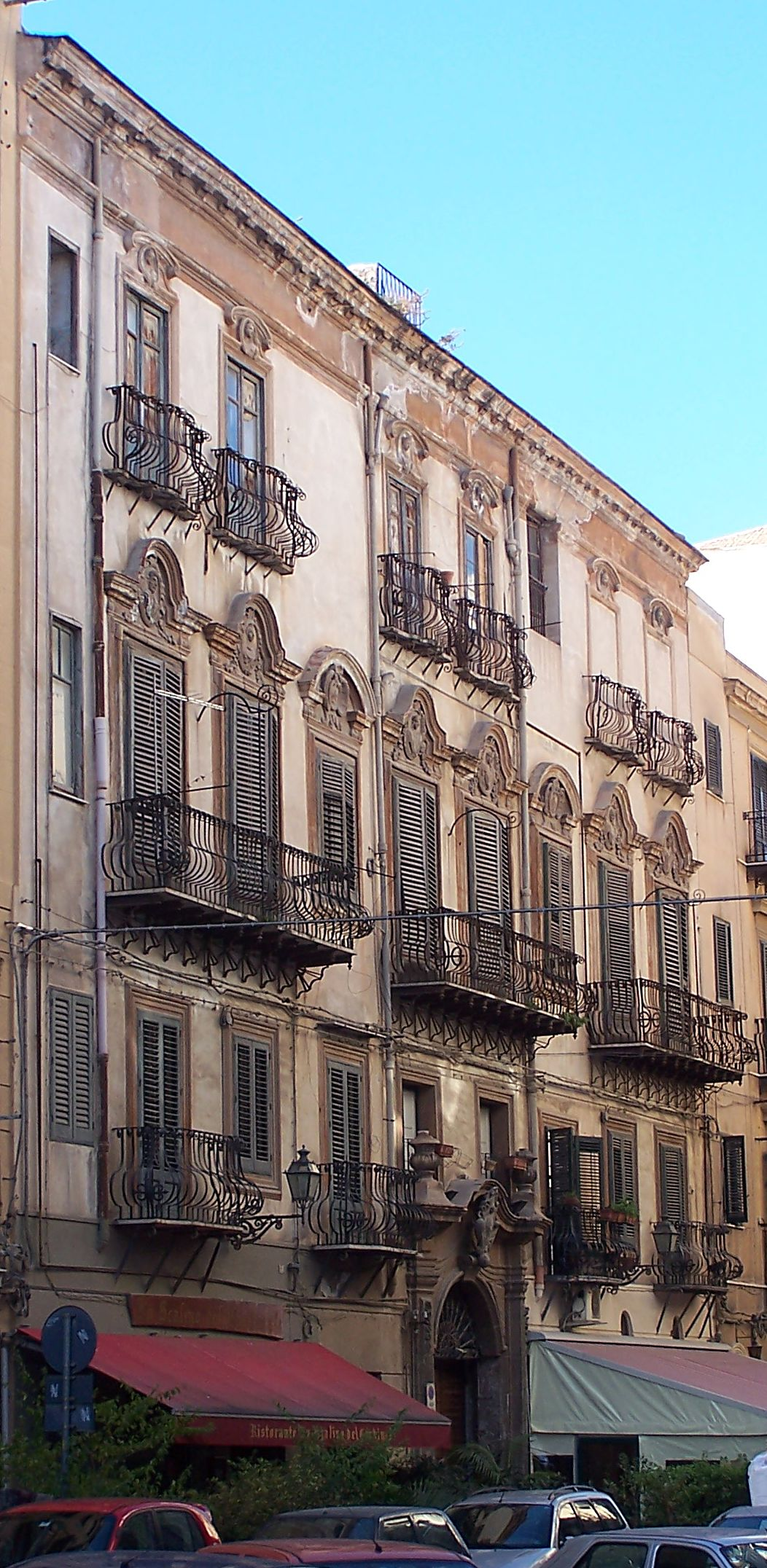 Palermo, Palazzo Trabucco, XVIII secolo